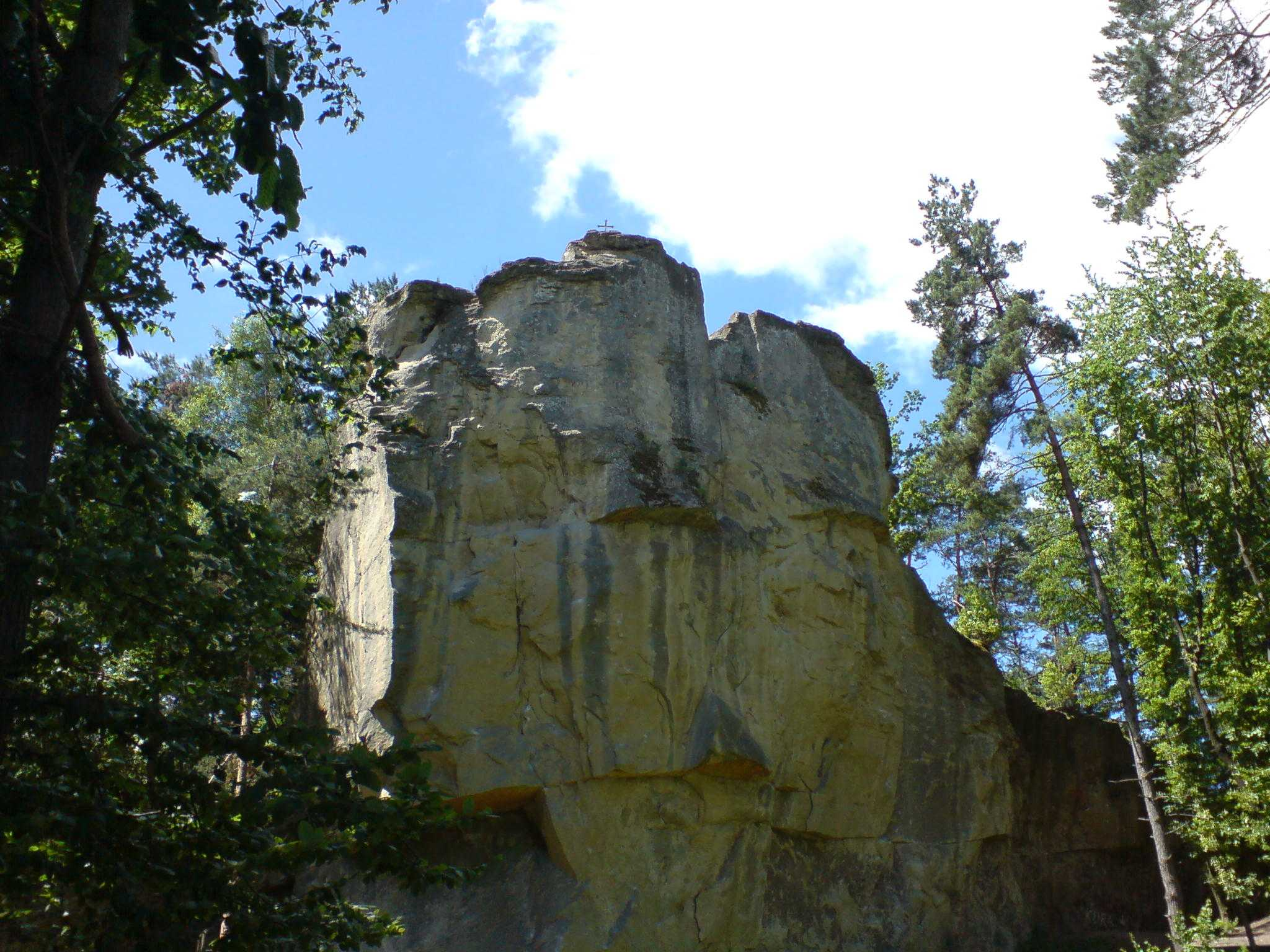 Skałka leska